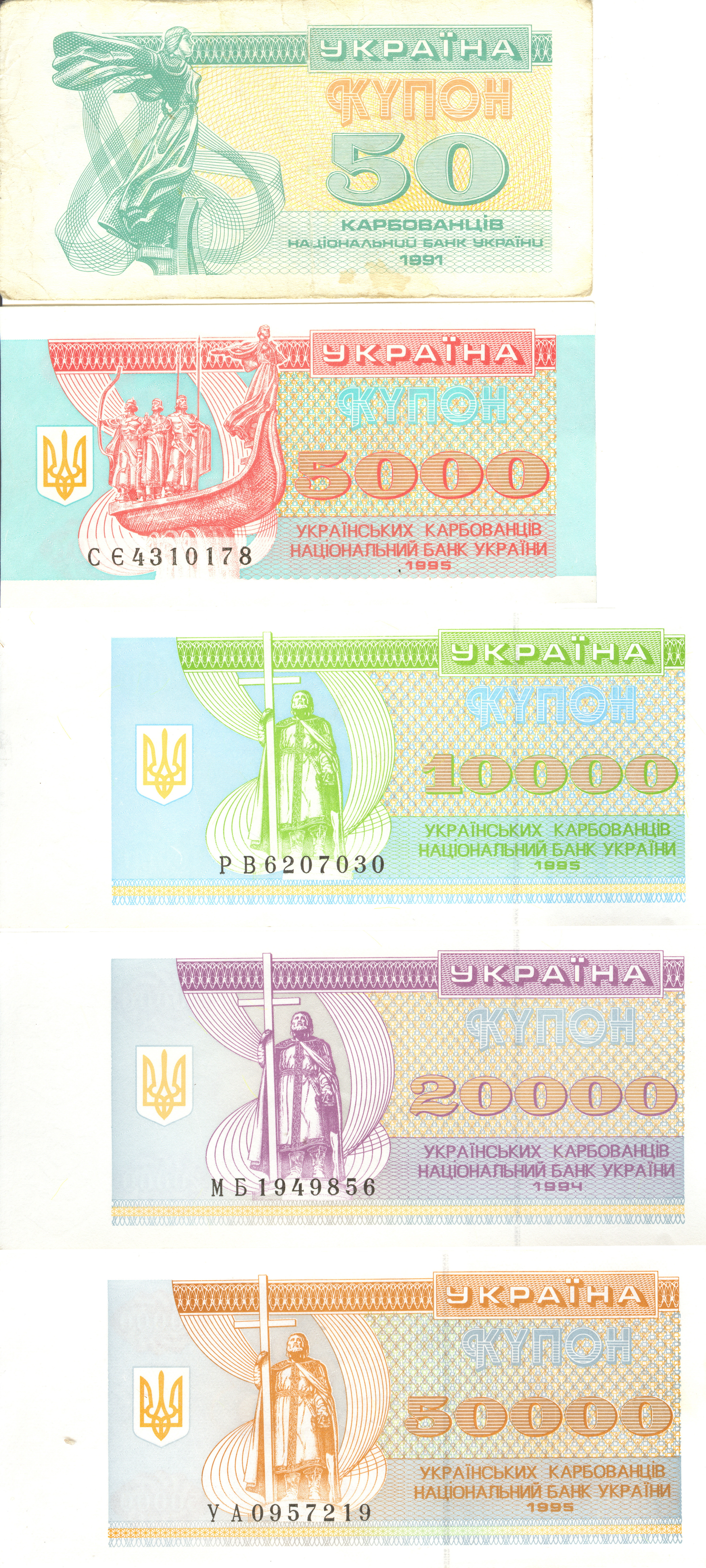 Украинские карбованцы 1991—1996. Аверс